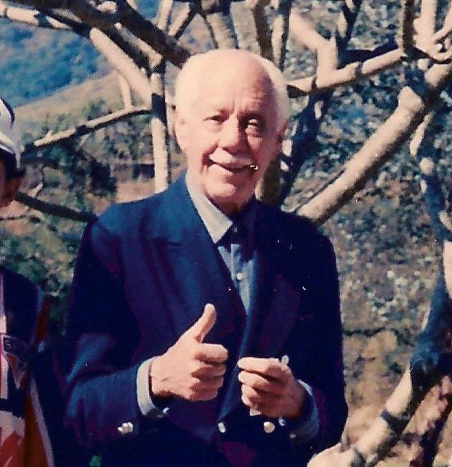 Cantor Sílvio Caldas em Atibaia